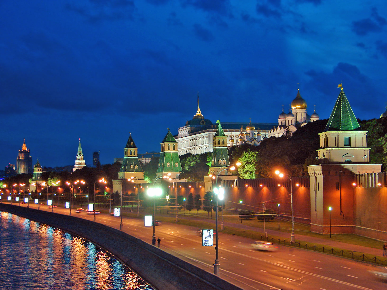 Kreml-Mauer an der Moskwa